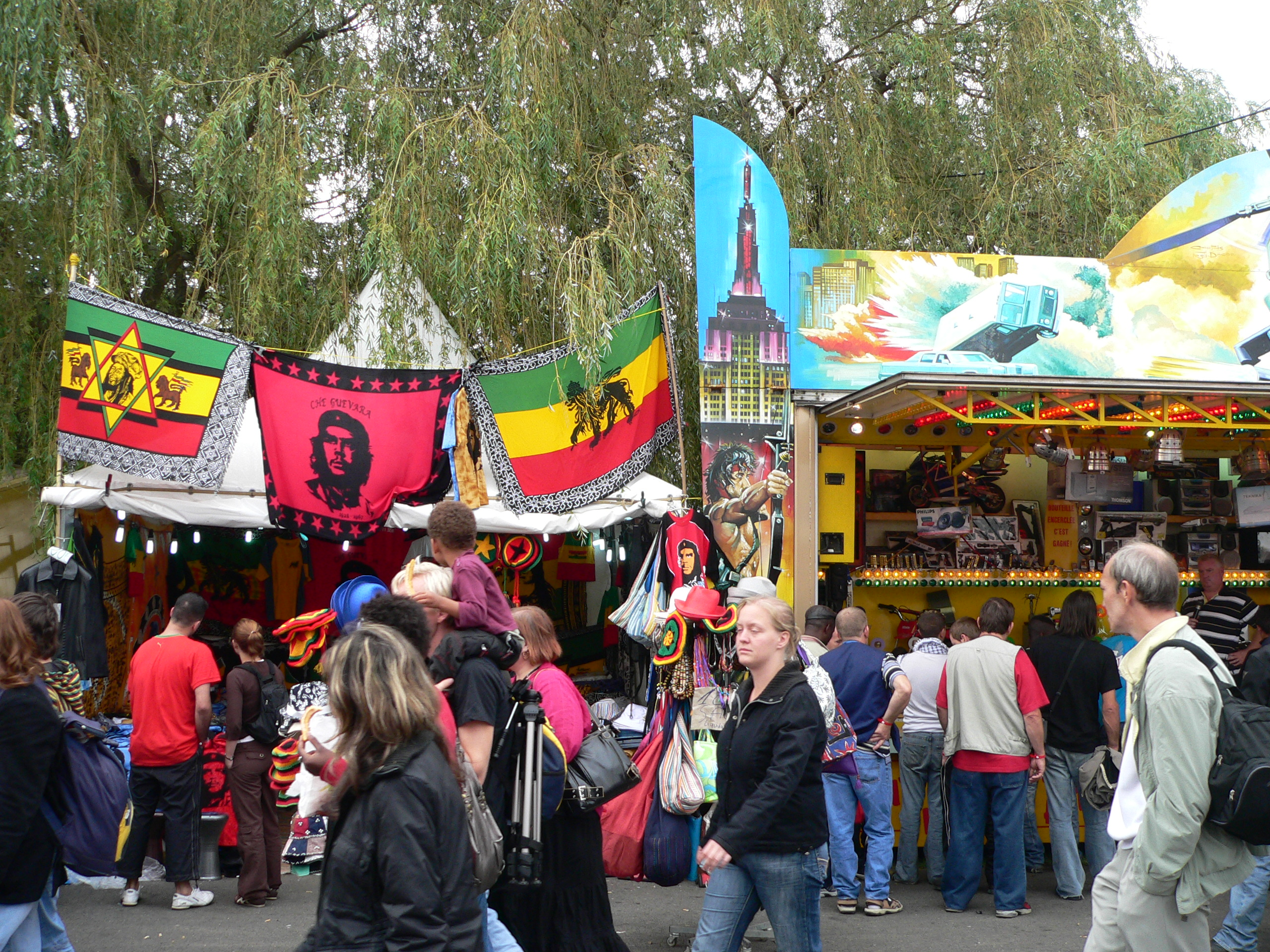 Fête de l’Humanité, 15 July 2006-17 July 2006